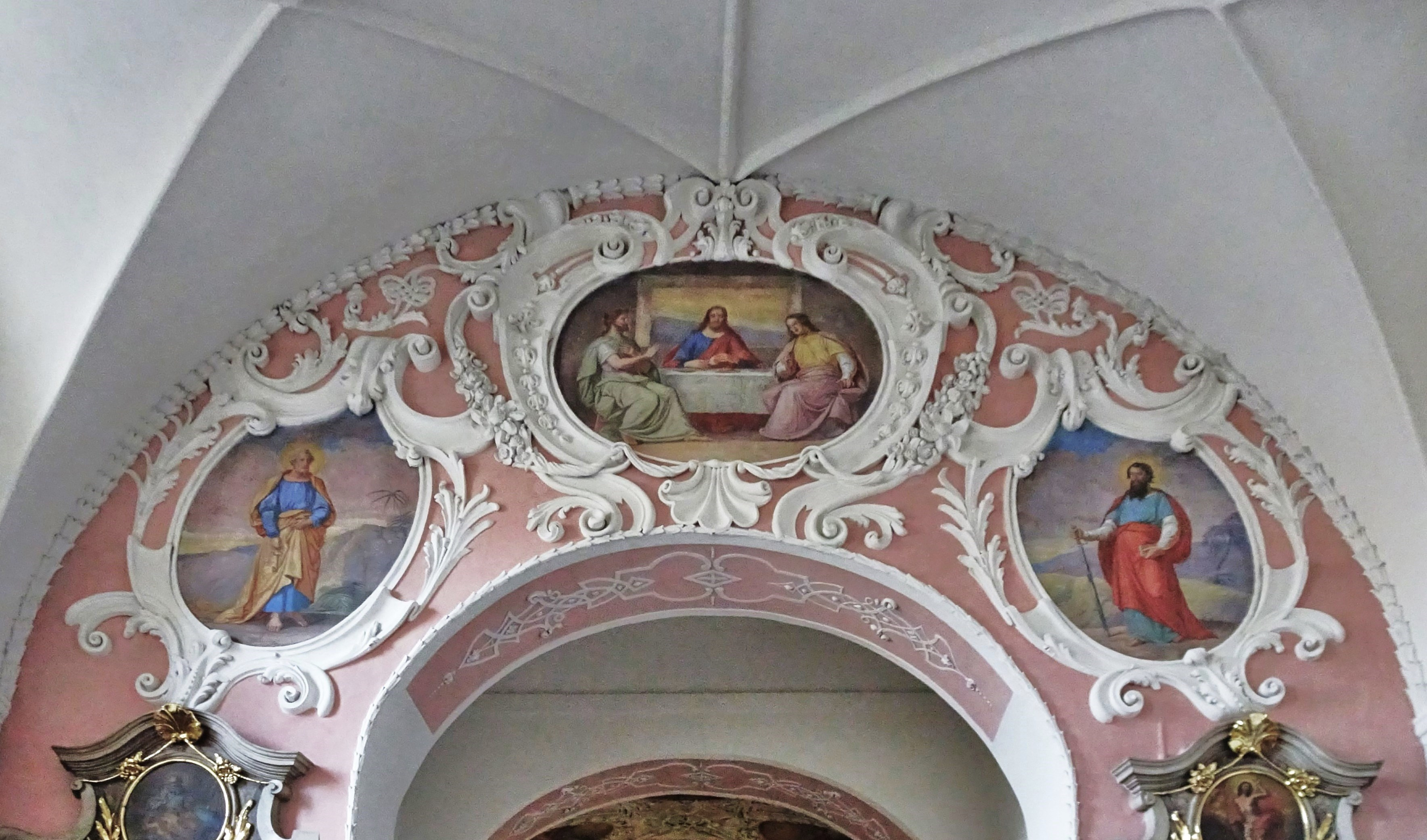 Marienkirche (Klagenfurt am Wörthersee), der Triumphbogen